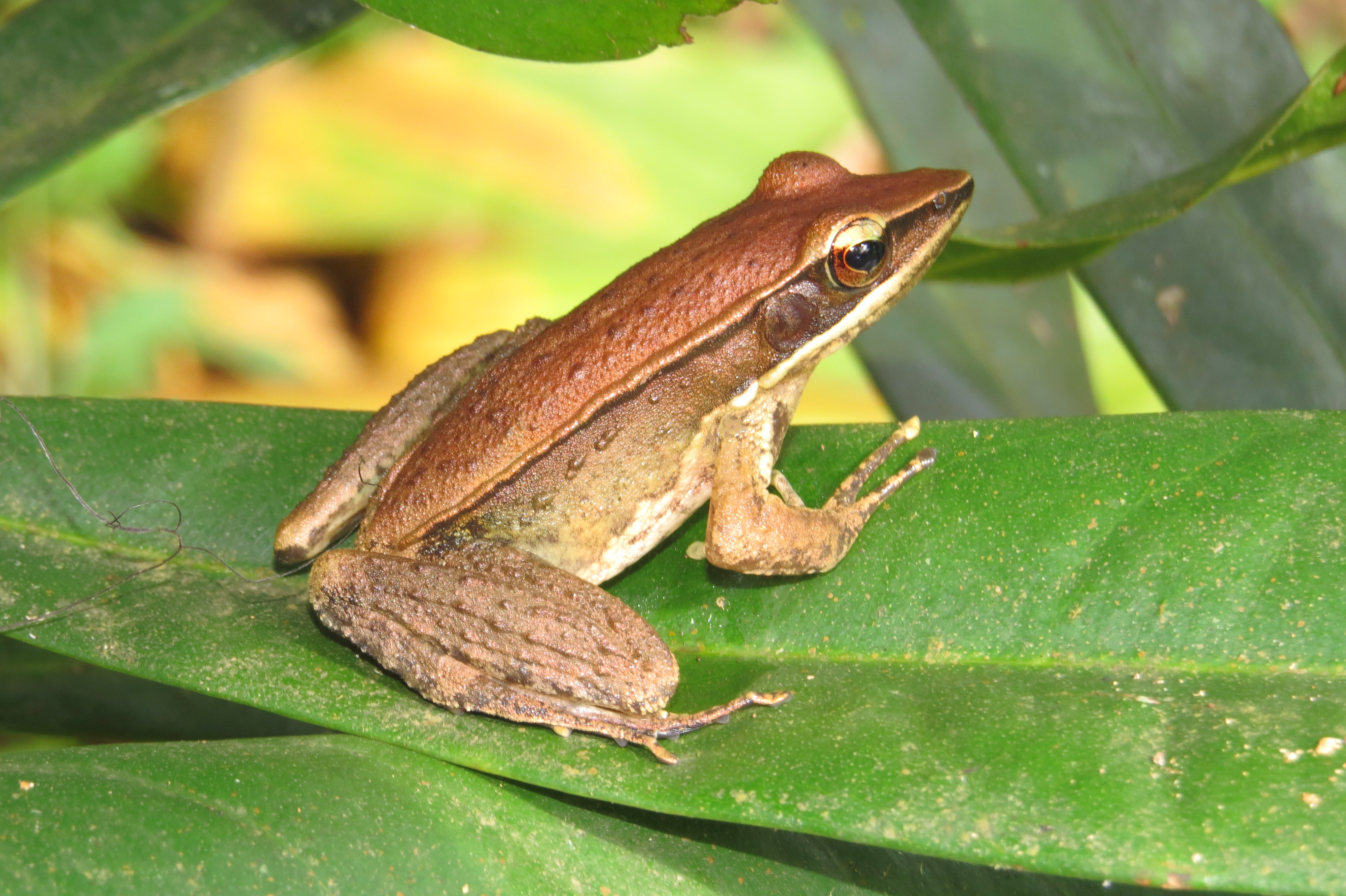 Photos taken during Periyar butterfly survey at Sabarimala, 2014 by Vinayaraj